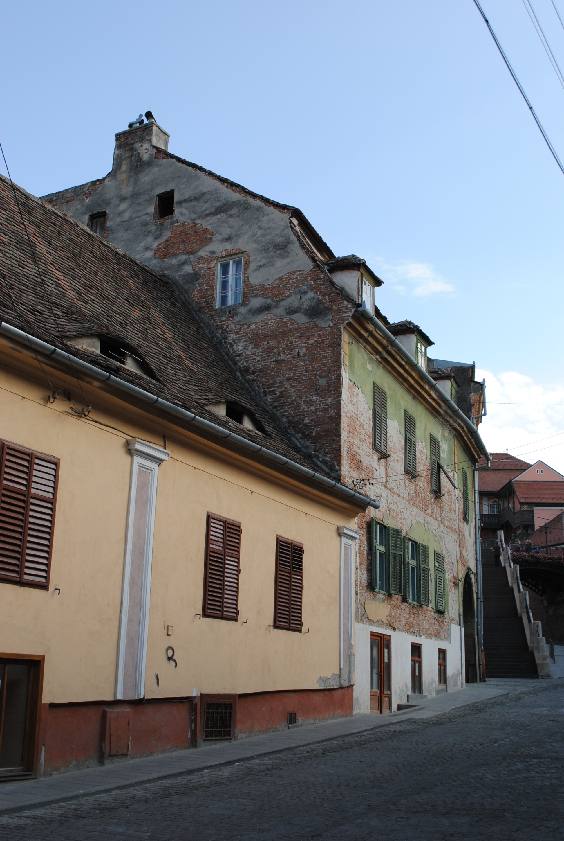 Casă, a doua jum. sec. XV - primul sfert al sec. XVI, sec. XVIII; mijl. sec. XIX